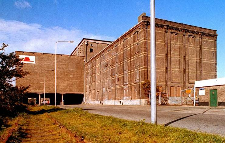 Achtergevel pakhuizen Amerika en Australië in Amsterdam